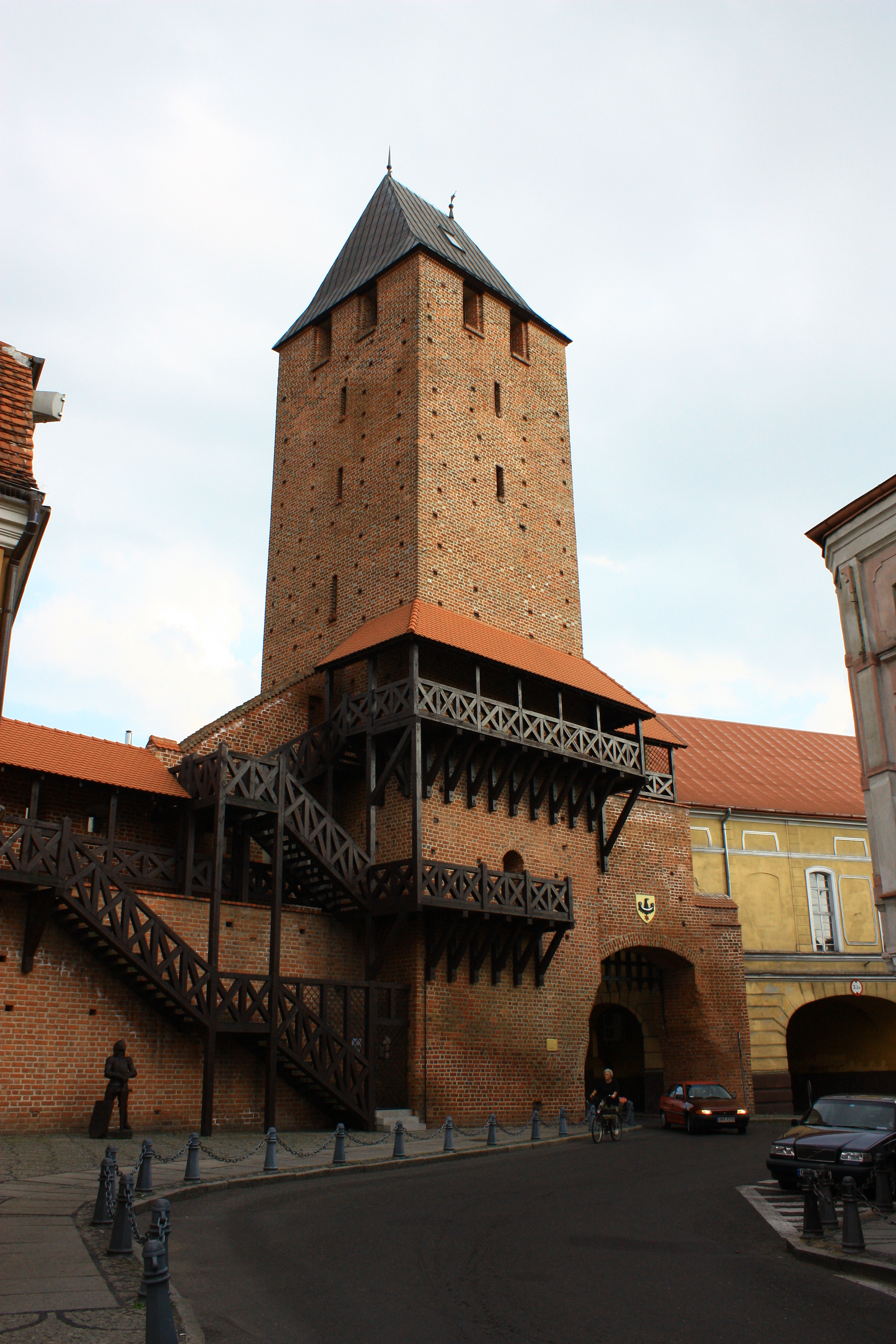 Namysłów, Brama Krakowska, 1390, XIX